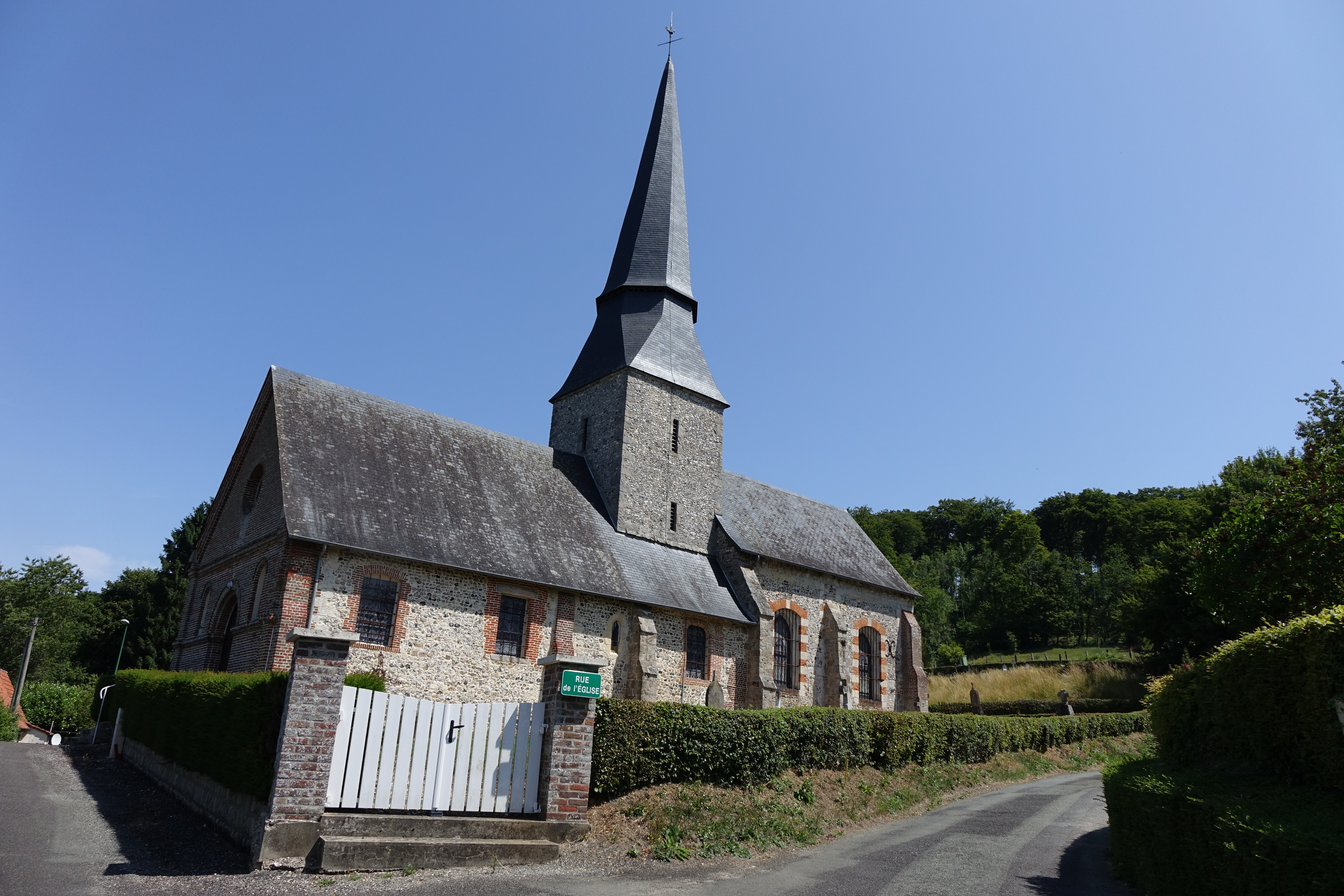 Église de Rosay, Seine-Maritime, France